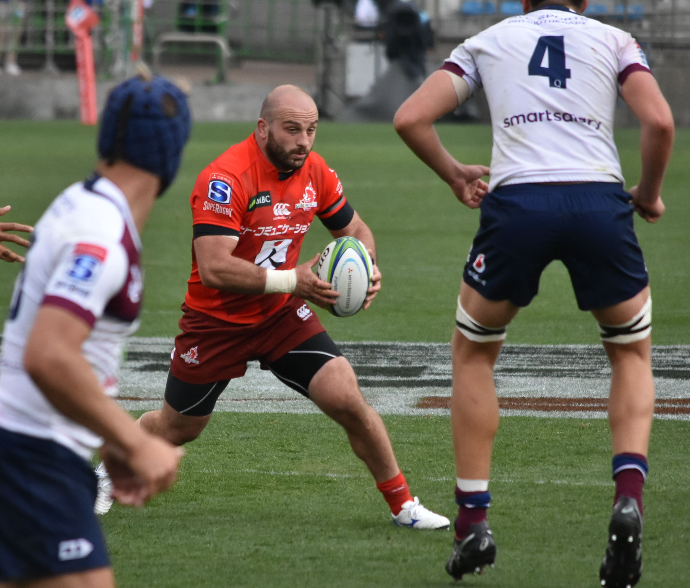 ジャバ・ブレグヴァゼ。秩父宮ラグビー場にて。 Nikon D3400